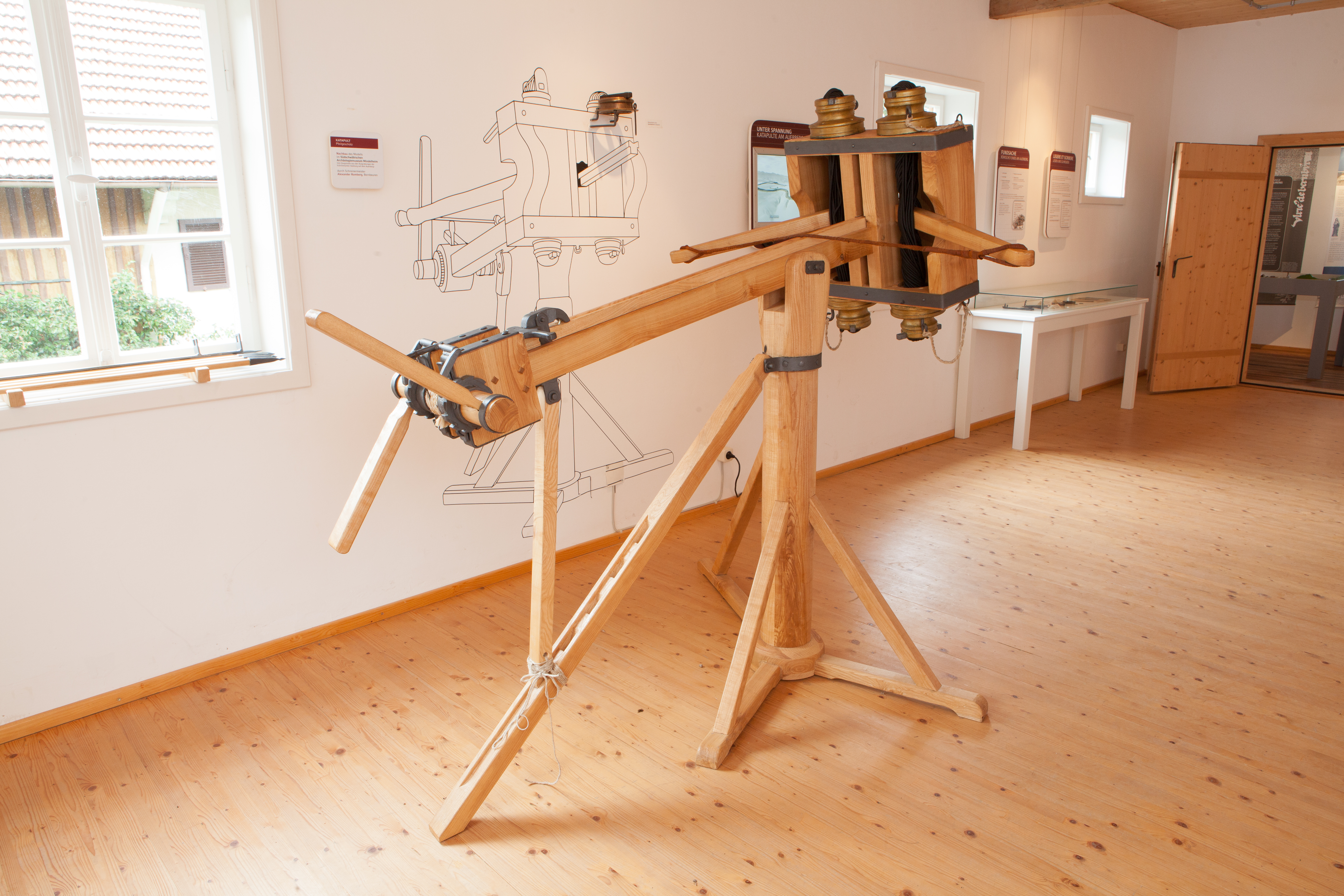 Ausstellungsstück im Auerbergmuseum in Bernbeuren: "Katapult (Pfeilgeschütz) – Nachbau des Modells im Südschwäbischen Archäologiemuseum Mindelsheim durch Schreinermeister Alexander Romberg, Bernbeuren"